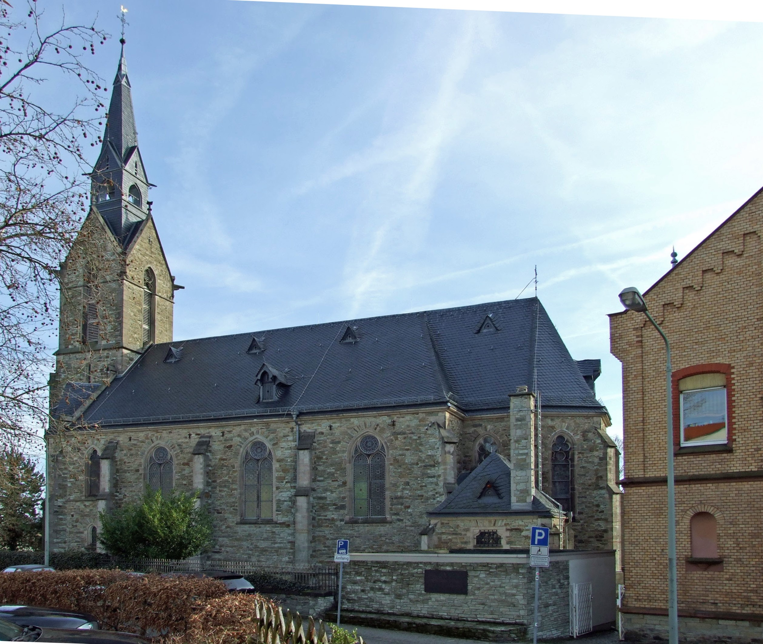 „St. Peter und Paul“ mit Gedenktafel zur Vatikanischen Vertretung, Kronberger Altstadt